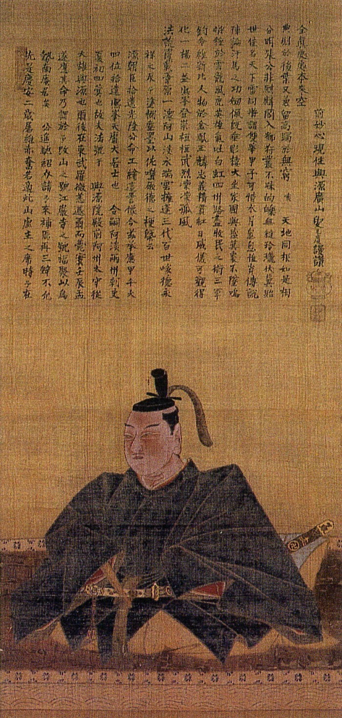 阿波徳島藩主・蜂須賀忠英の肖像画。